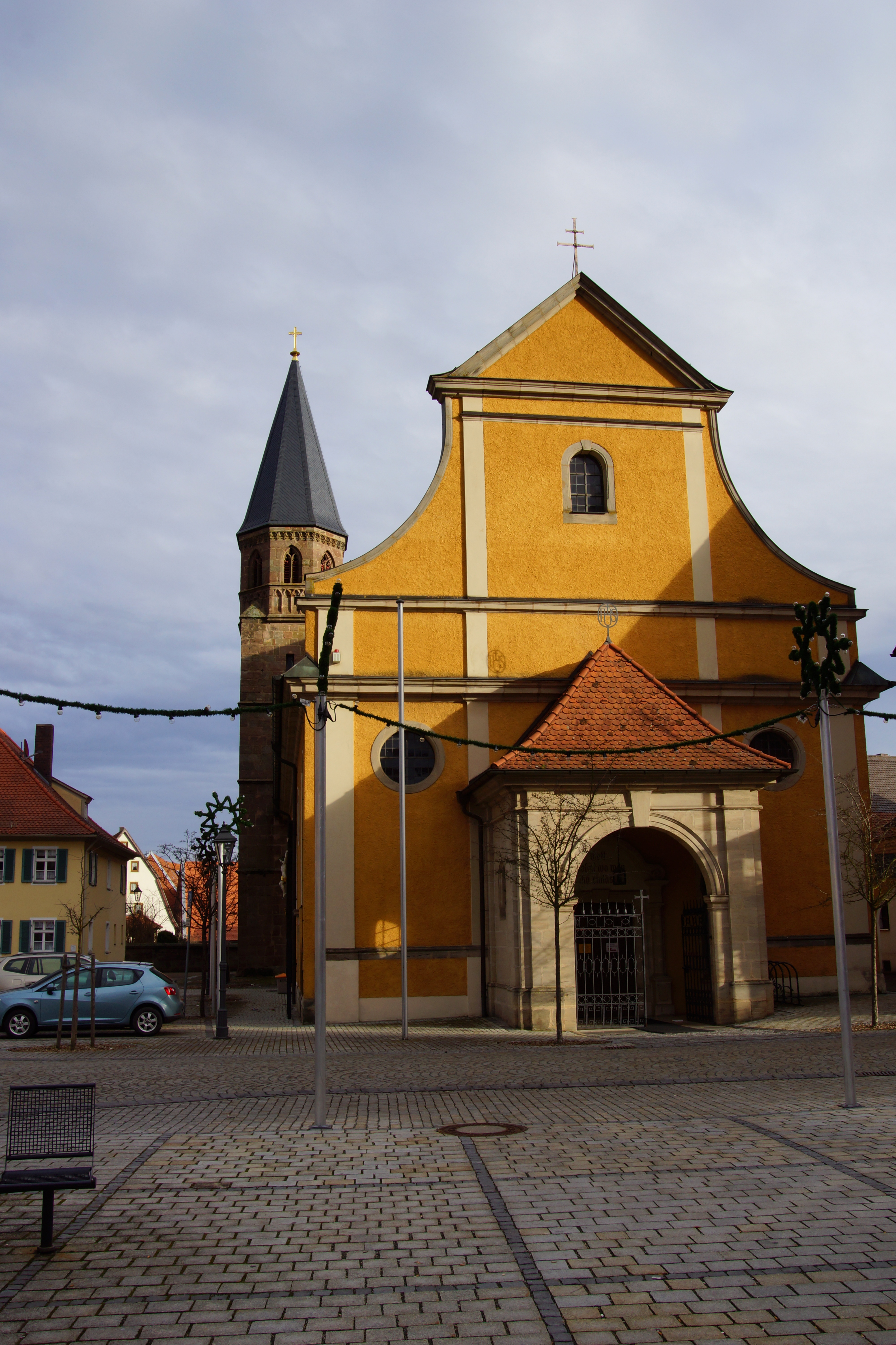 Die Pfarrkirche St. Johannes Baptist in Heideck